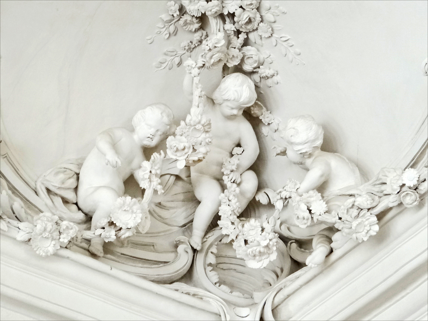 Le salon blanc (white hall) est la plus grande pièce du palais (308 m2) Initialement prévue pour servir de chapelle, la pièce a été transformée en salle de bal et terminée en 1770. Les décorations en stuc de Johann Michael Graff sont exceptionnelles, elles représentent des allégories des 4 saisons, des scènes pastorales, artisanales ou musicales comme celle photographiée. Le salon a été restauré de 1973 à 1980 par des spécialistes russes de Saint Pétersbourg. Le palais de Rundale est l'un des monuments les plus remarquables de l'art baroque et rococo en Lettonie. Il a été construit entre 1736 et 1740 comme résidence d'été du duc de Courlande : Ernst Johann von Biron (1690-1772), favori de l'impératrice de Russie Anna Ioannovna (1693-1740). L'architecte italien Francesco Bartolomeo Rastrelli (1700-1771) a conçu le Palais de Rundale et en a supervisé les travaux de construction. Il est l'architecte de nombreux bâtiments officiels de Saint Pétersbourg. Après la mort de l'impératrice Anna Ioannovna, le duc a été arrêté et envoyé en exil en Sibérie. Les travaux de construction du palais ont repris après le retour du duc en 1763 au début du règne de l'impératrice Catherine II. La majeure partie de l'intérieur du palais a été créée entre 1765 et 1768. Les maîtres italiens de Saint-Pétersbourg : Martini Francesco et Carlo Zucchi sont les auteurs des peintures sur les plafonds et les murs tandis que le sculpteur Johann Michael Graff de Berlin a fait les décorations en stuc sur fond de marbre artificiel. Article de Wikipedia sur Biron Article de Wikipedia sur le palais Site du palais de Rundale (en)